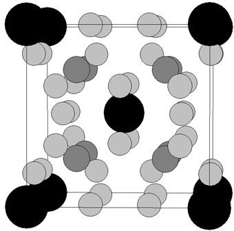 Structure cristalline skutterudite remplie. schéma réalisée par Utilisateur:David Berardan) Utilisateur:David Berardan